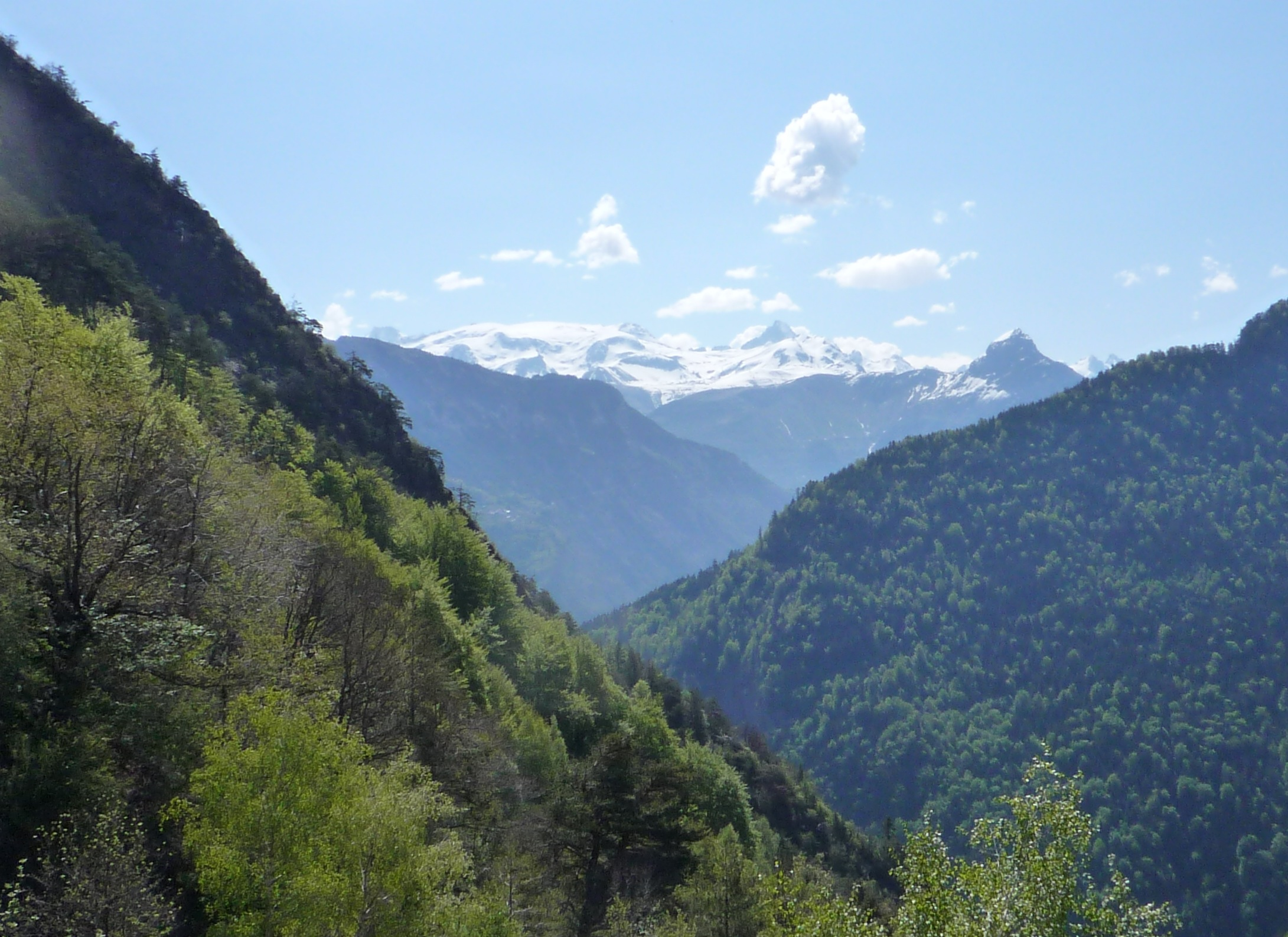 Oulles, Isère, France.